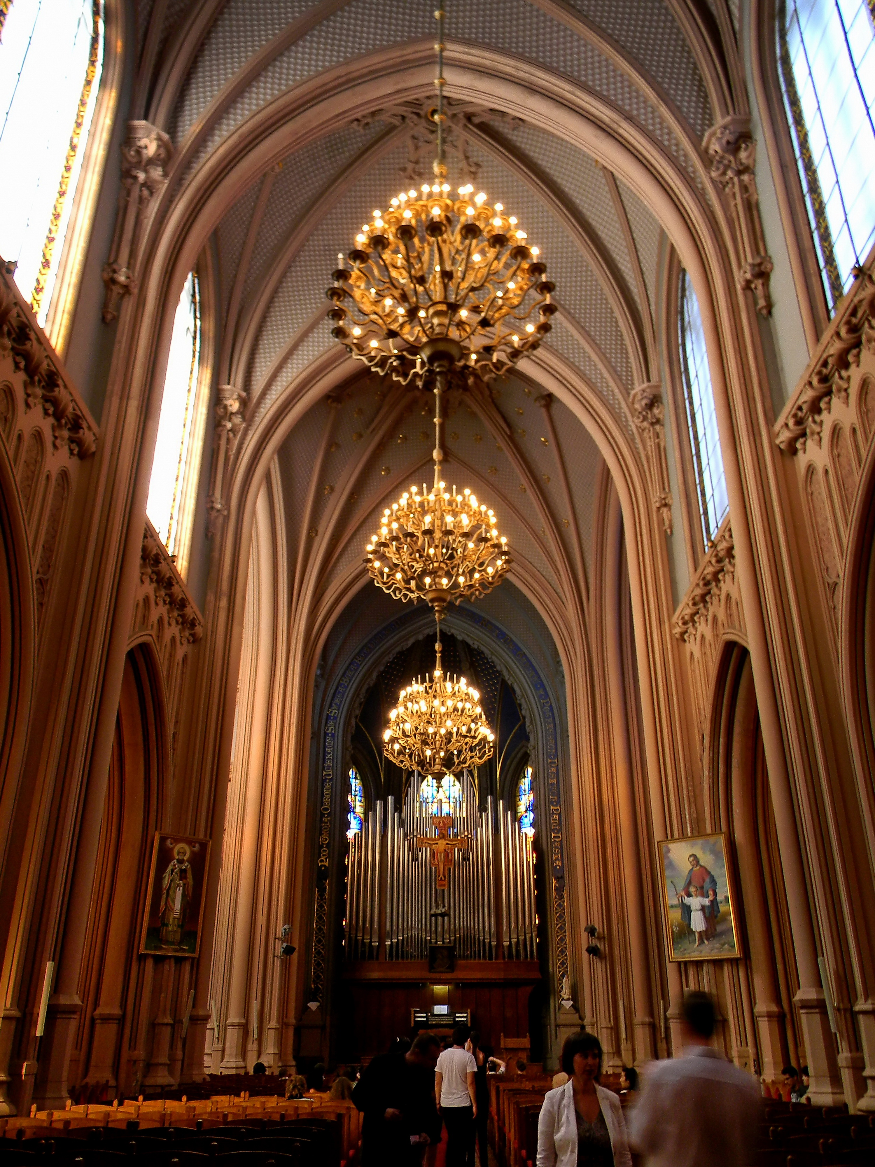 Костьол св. Миколая, Київ, Червоноармійська вул., 77